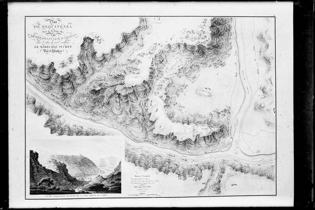 Imatge